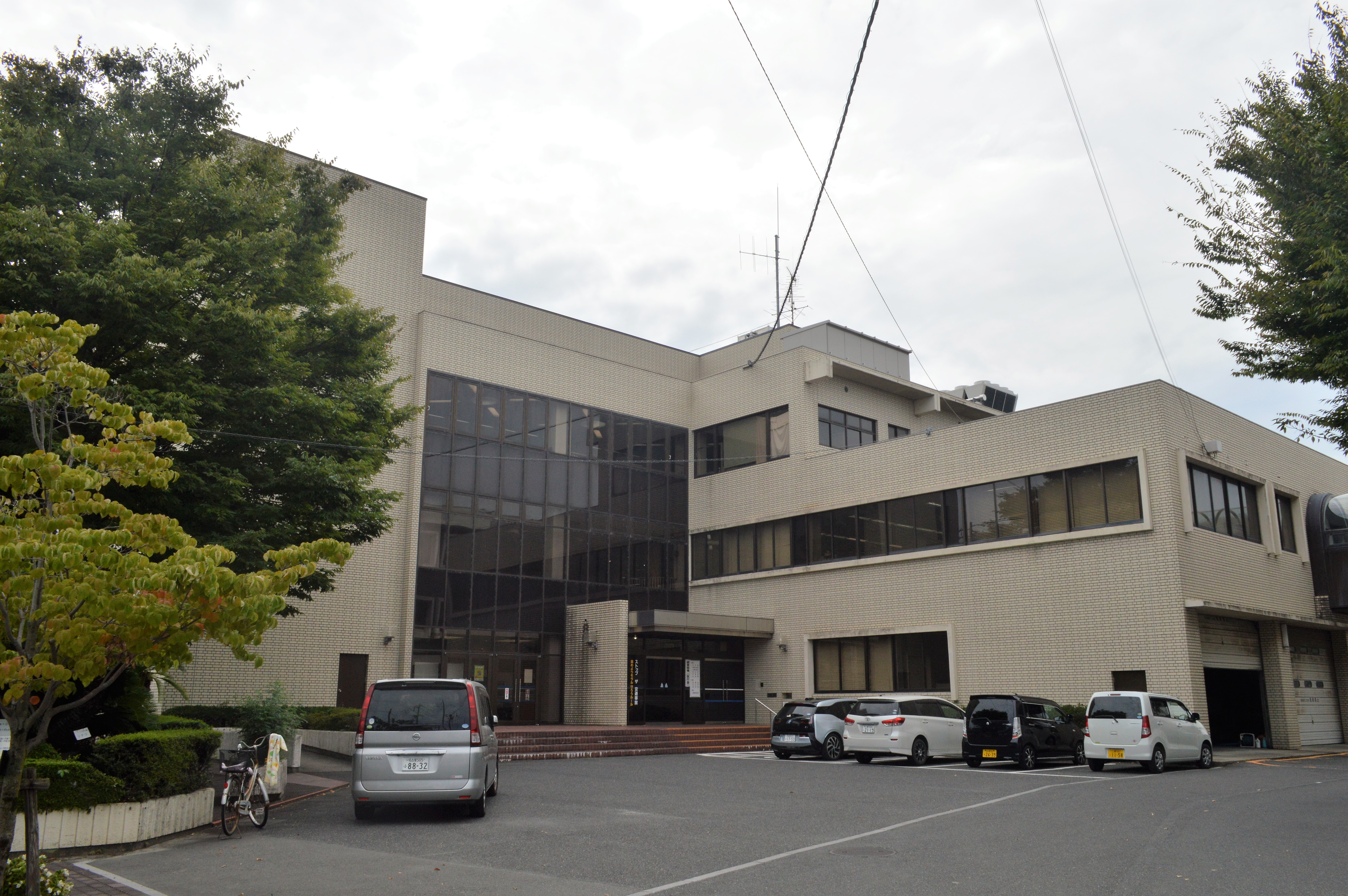 弥富市役所仮庁舎（図書館棟）。弥富市立図書館などが入っている。